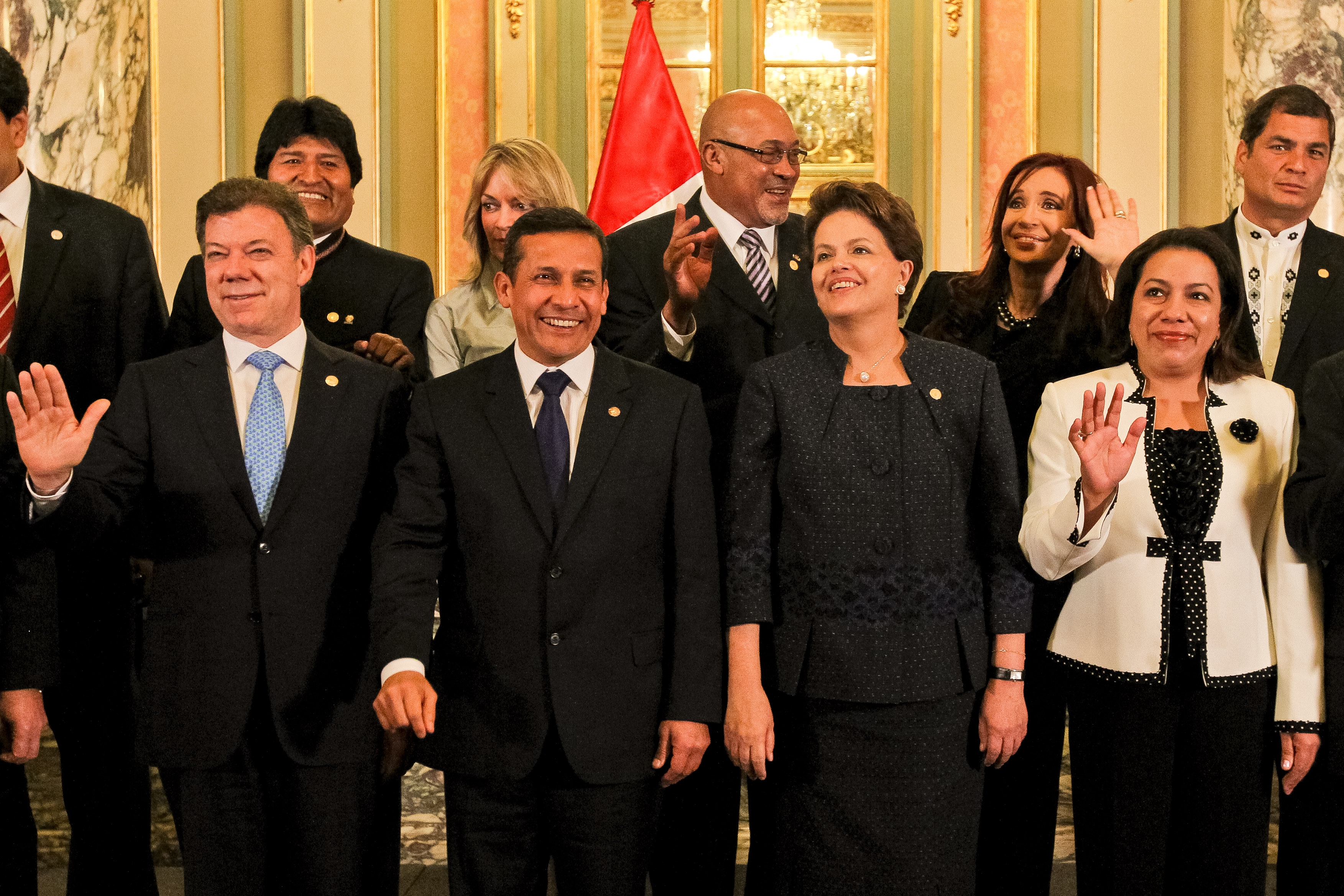 La presidenta Cristina Fernández posa junto a otros mandatarios de Unasur, tras la asunción de Ollanta Humala como nuevo presidente de Perú. Entre otros, están presentes los presidentes de Brasil, Dilma Rousseff, de Colombia, Juan Manuel Santos, de Bolivia, Evo Morales, de Ecuador, Rafael Correa, y la secretaria ejecutiva de Unasur, María Emma Mejía.